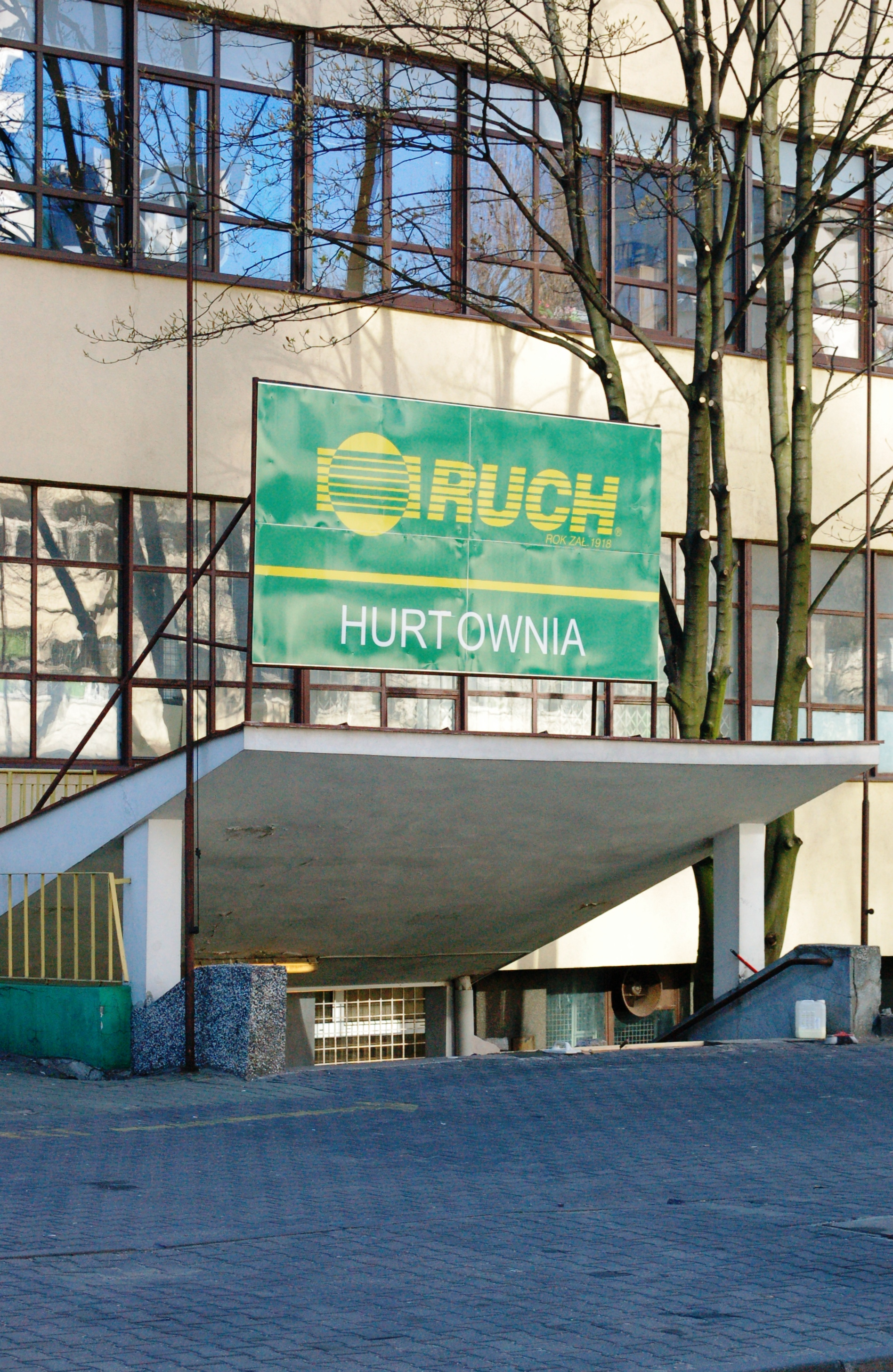 Warschau, RUCH-Grosshandelsstelle